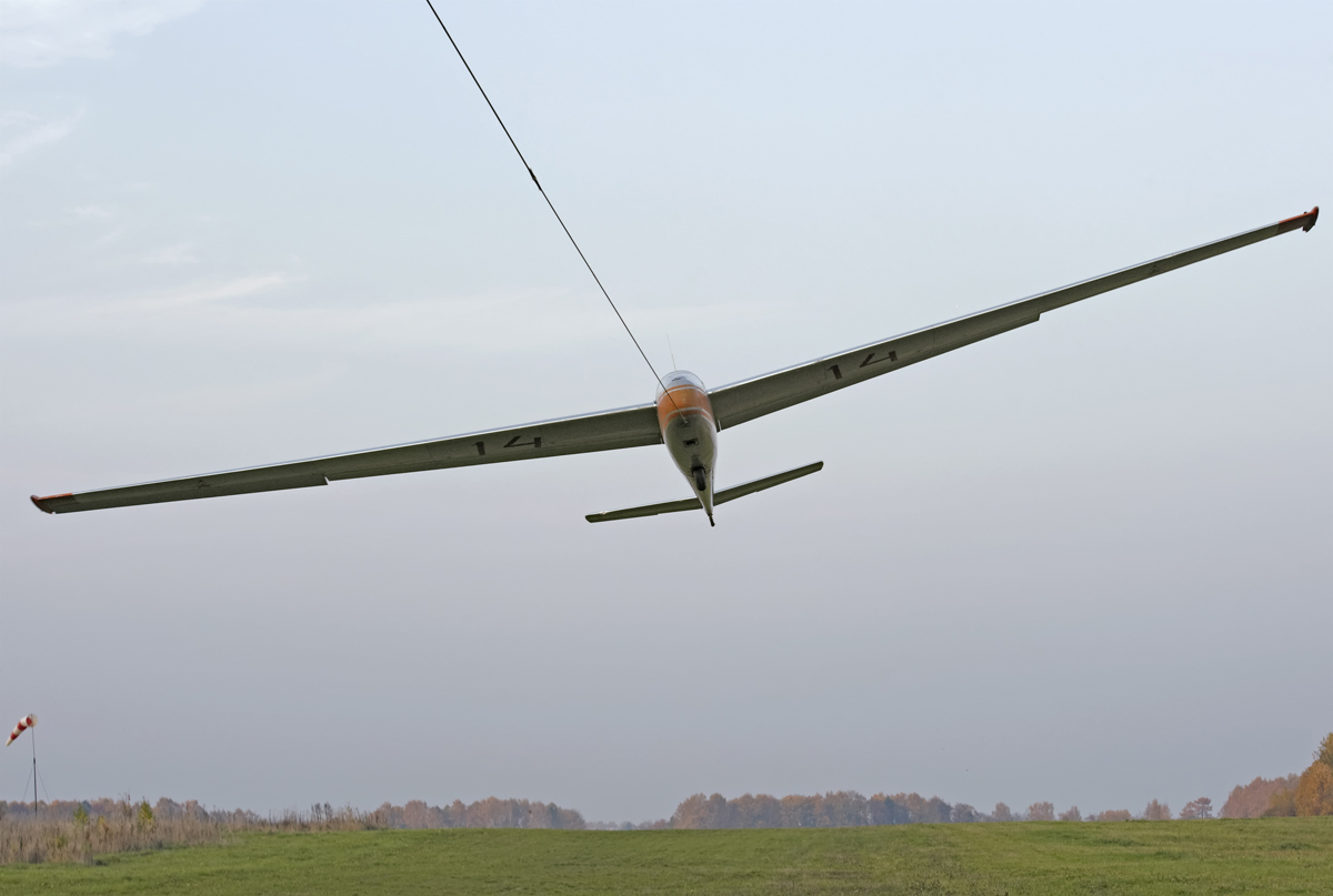 Blanik L-13